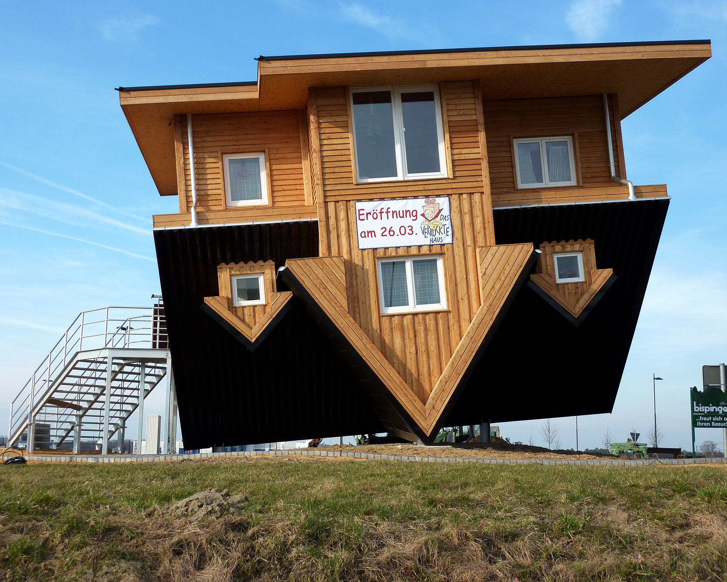 Auf dem Kopf stehendes Haus mit vollständiger Möblierung in Bispingen, Landkreis Soltau-Fallingbostel. Für Besucher begehbar ab 26.03.2011.